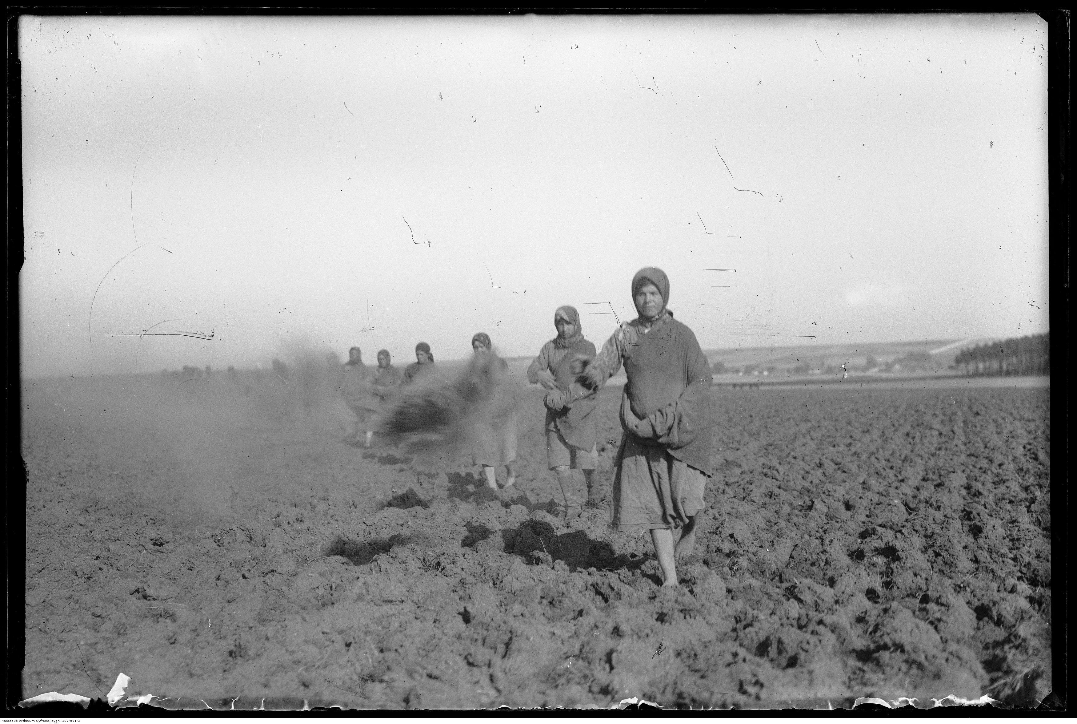 Wysiew nawozu przez kobiety.